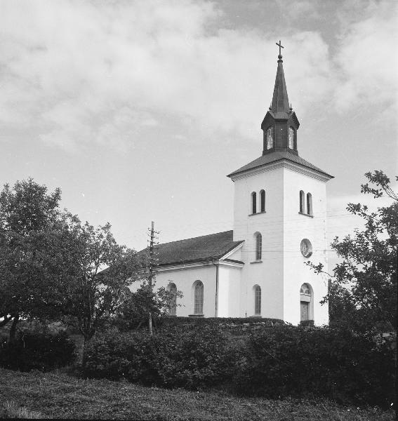 Kyrkan från nordväst.